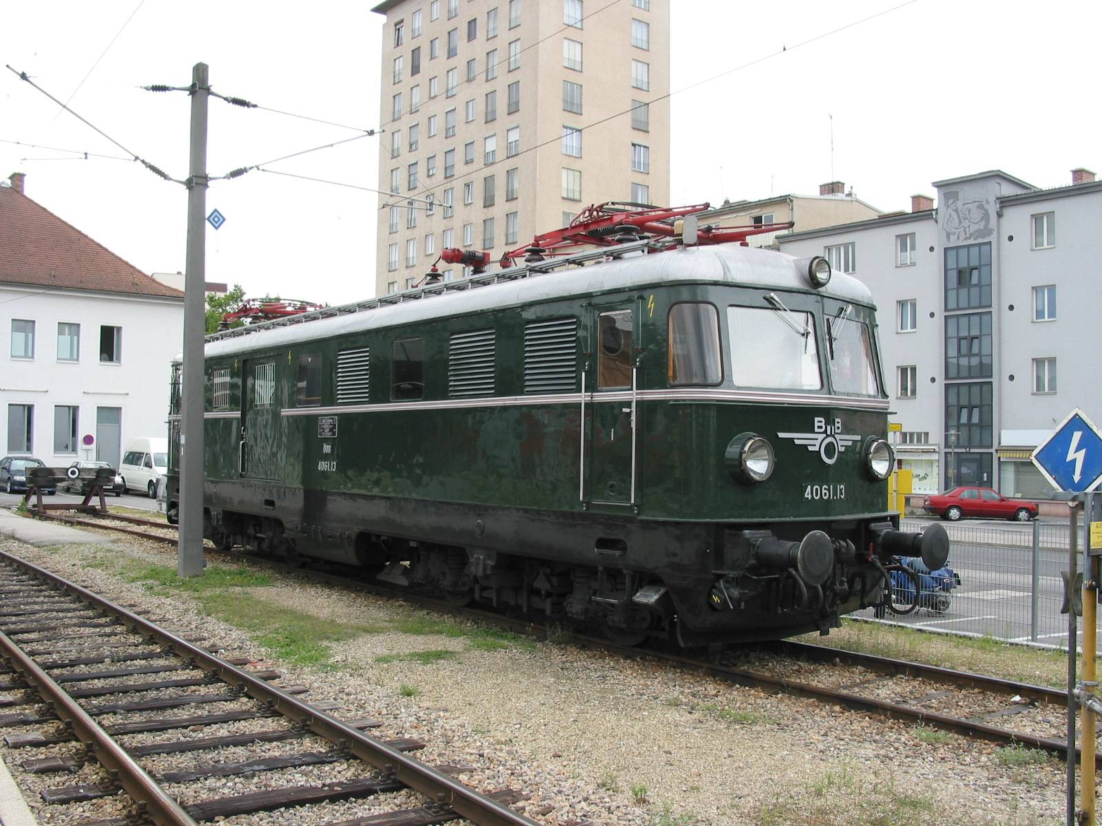 de: ÖBB 4061 (=ÖBB 1046) in Krems an der Donau en: ÖBB Class 4061 (=ÖBB 1046) in Krems an der Donau